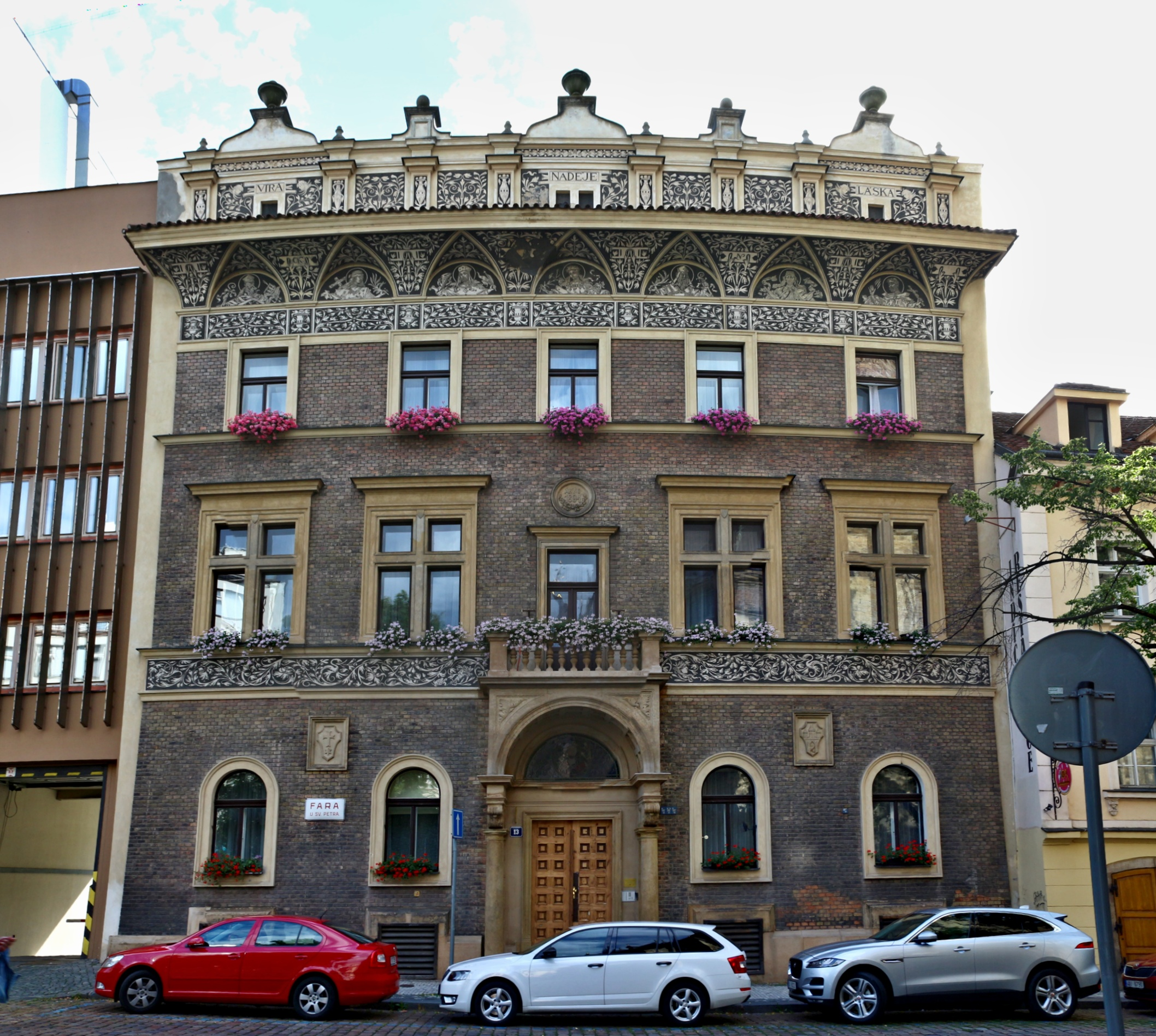 Kostel svatého Petra Na Poříčí, fara